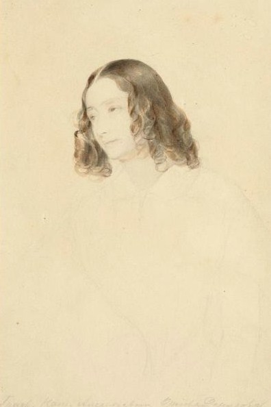 Графиня Наталья Алексеевна Орлова-Денисова, ур. Шидловская (1821-1883), известная красавица, жена графа Н.А.Орлова-Денисова (1815-1855), во втором браке за И.Д.Лужиным (1804-1868).